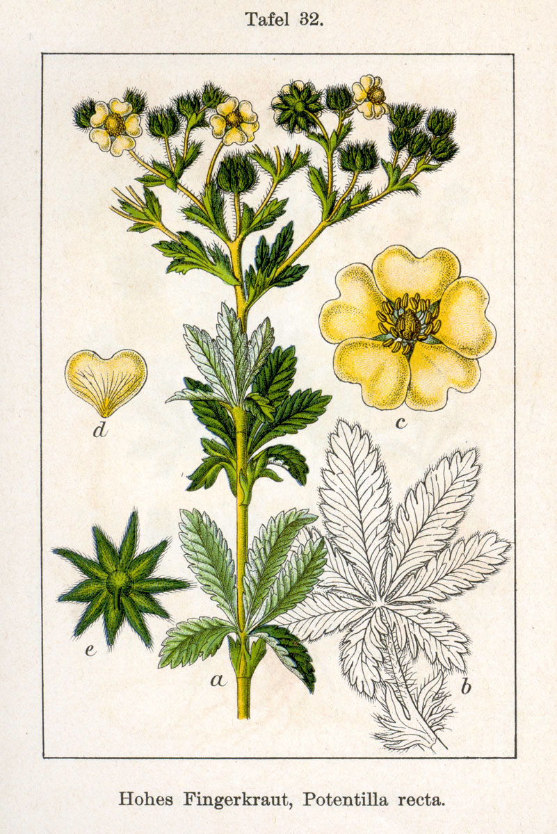 Potentilla recta L. Original Description Hohes Fingerkraut, Potentilla recta